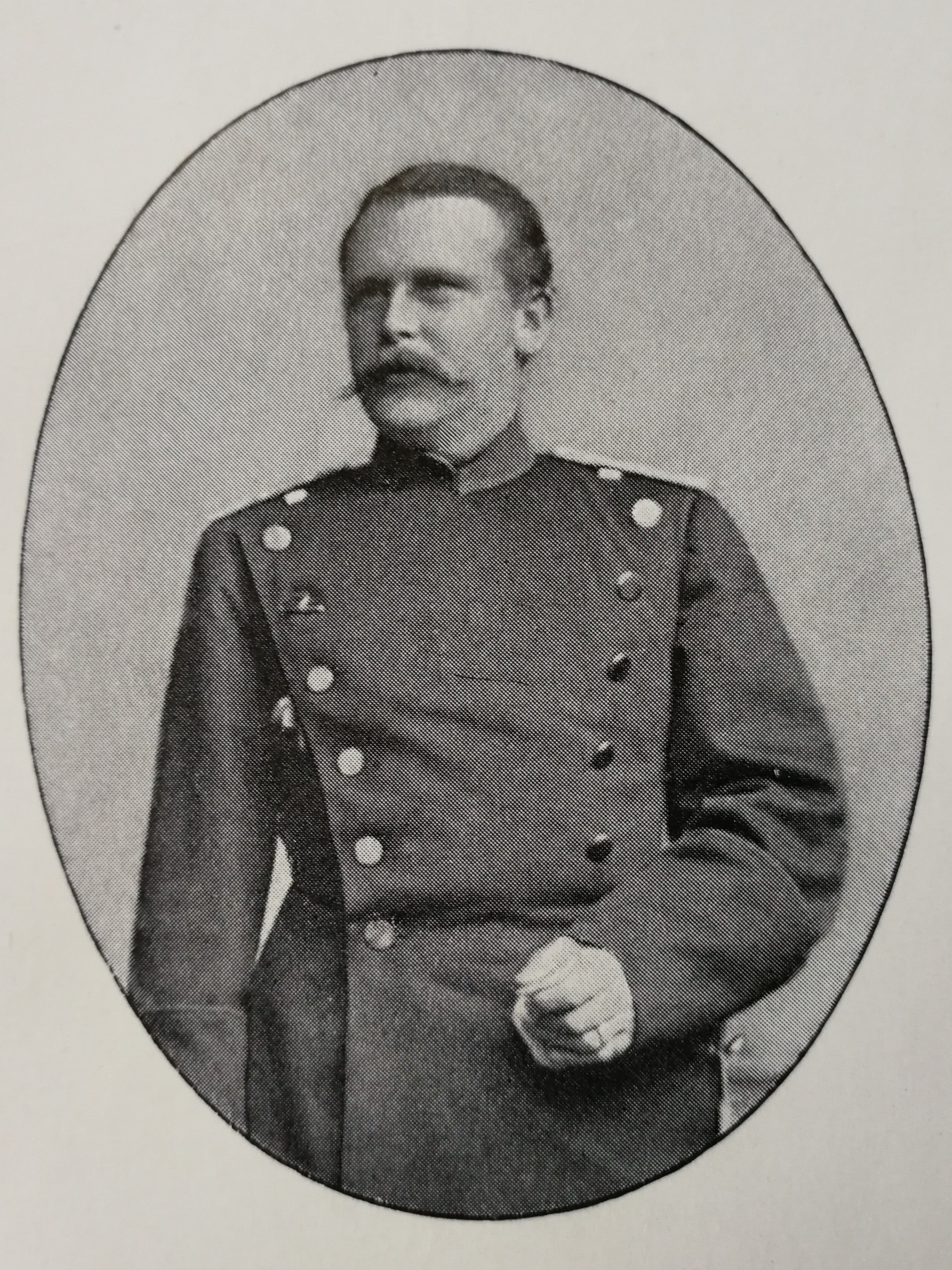 Henry Victor "Punchy" von Burt (* 15. Januar 1841 in Itzehoe), Atjutant, Schwager und Neffe von Helmuth von Moltke (d. Ä.); von 1884 bis 1892 Eigentümer und Bewohner der Villa Moltke in Blasewitz, Johannstraße 1 (ab 1892 Johannstraße 33; heute Dresden-Blasewitz, Regerstraße 2)